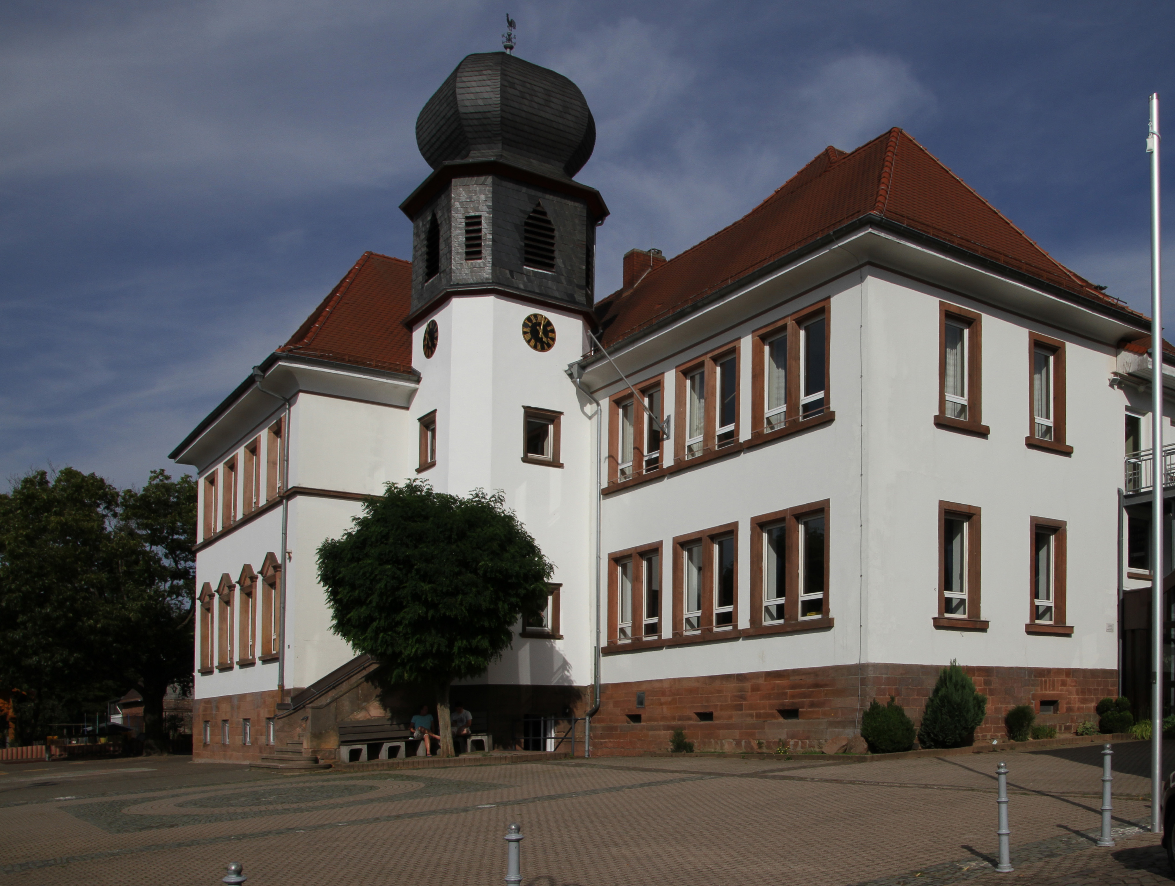 Schopp, Hauptstraße 11a/11b; Schule, zwei Walmdachbauten mit eingestelltem Zwiebelturm, 1904–23.